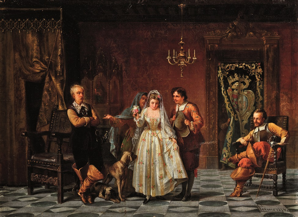 Scena storica, olio su tela, cm 55 x 75, firmato, coll. privata